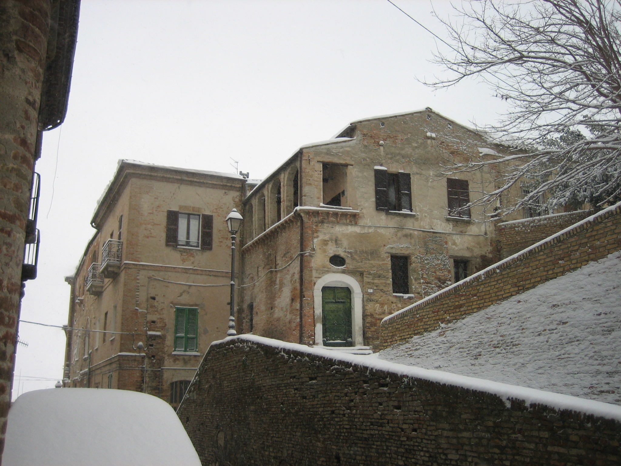 Penne (Pescara), il medievale Palazzo de' Vestini